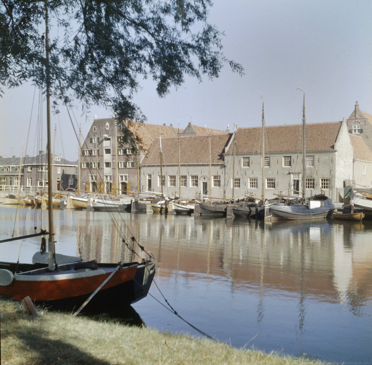 Zuiderzeemuseum: Overzicht van de gevels aan de Oosterhaven met onder andere het Peperhuis